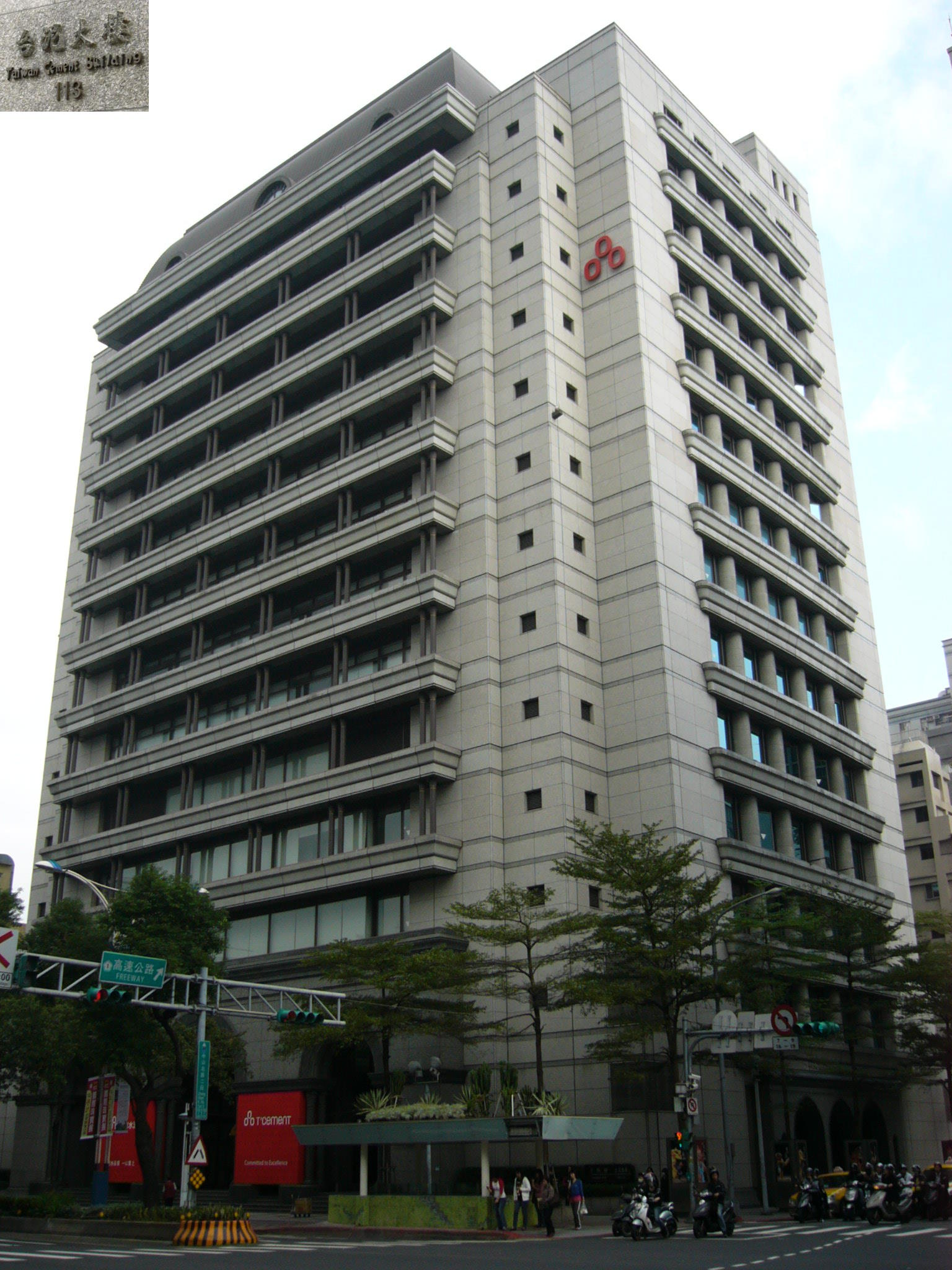 台泥大樓仰望圖與1樓鑄字招牌（左上）。